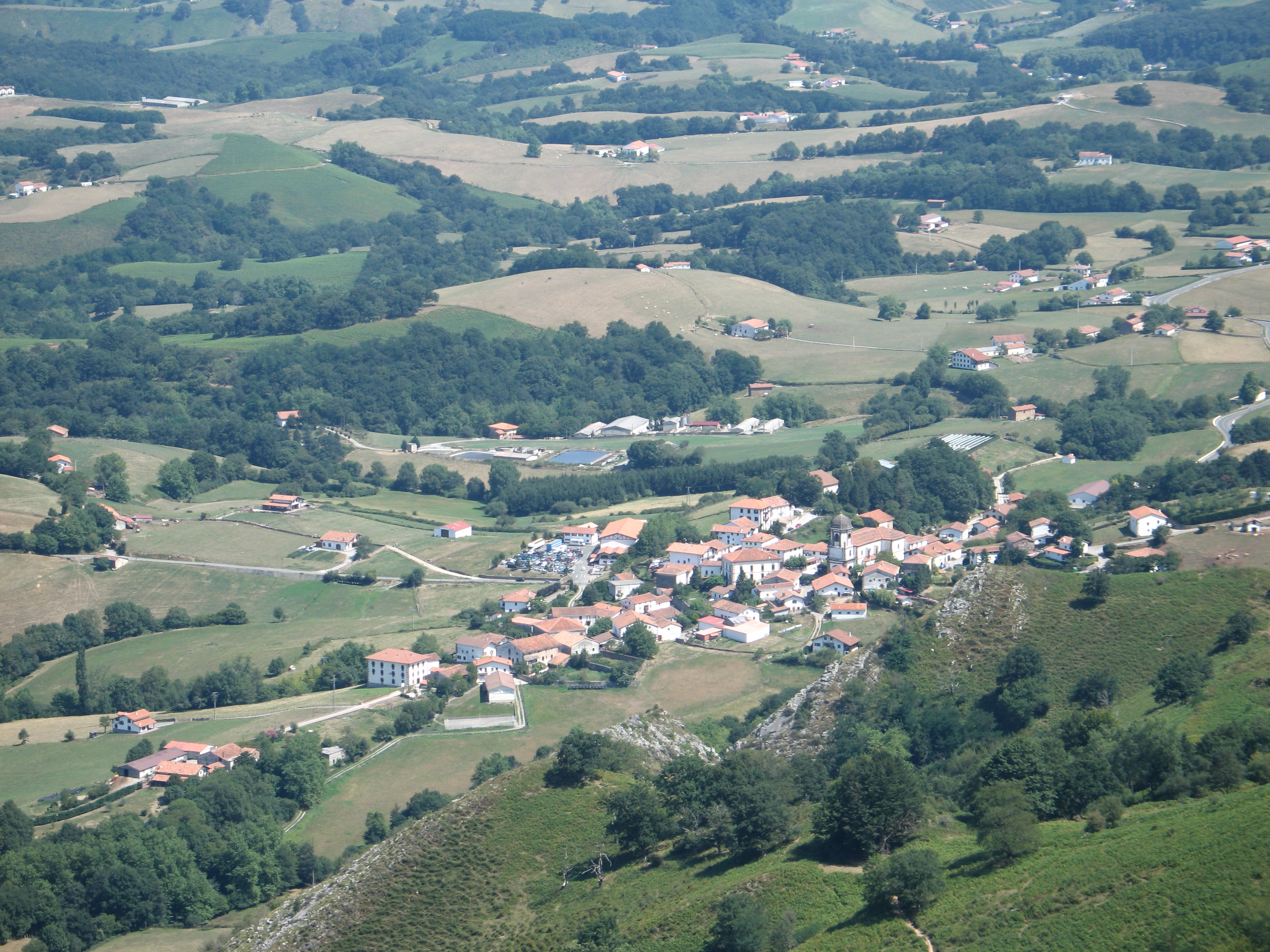 Zugarramurdi, Navarra, España Zugarramurdi, Navarre. Spain